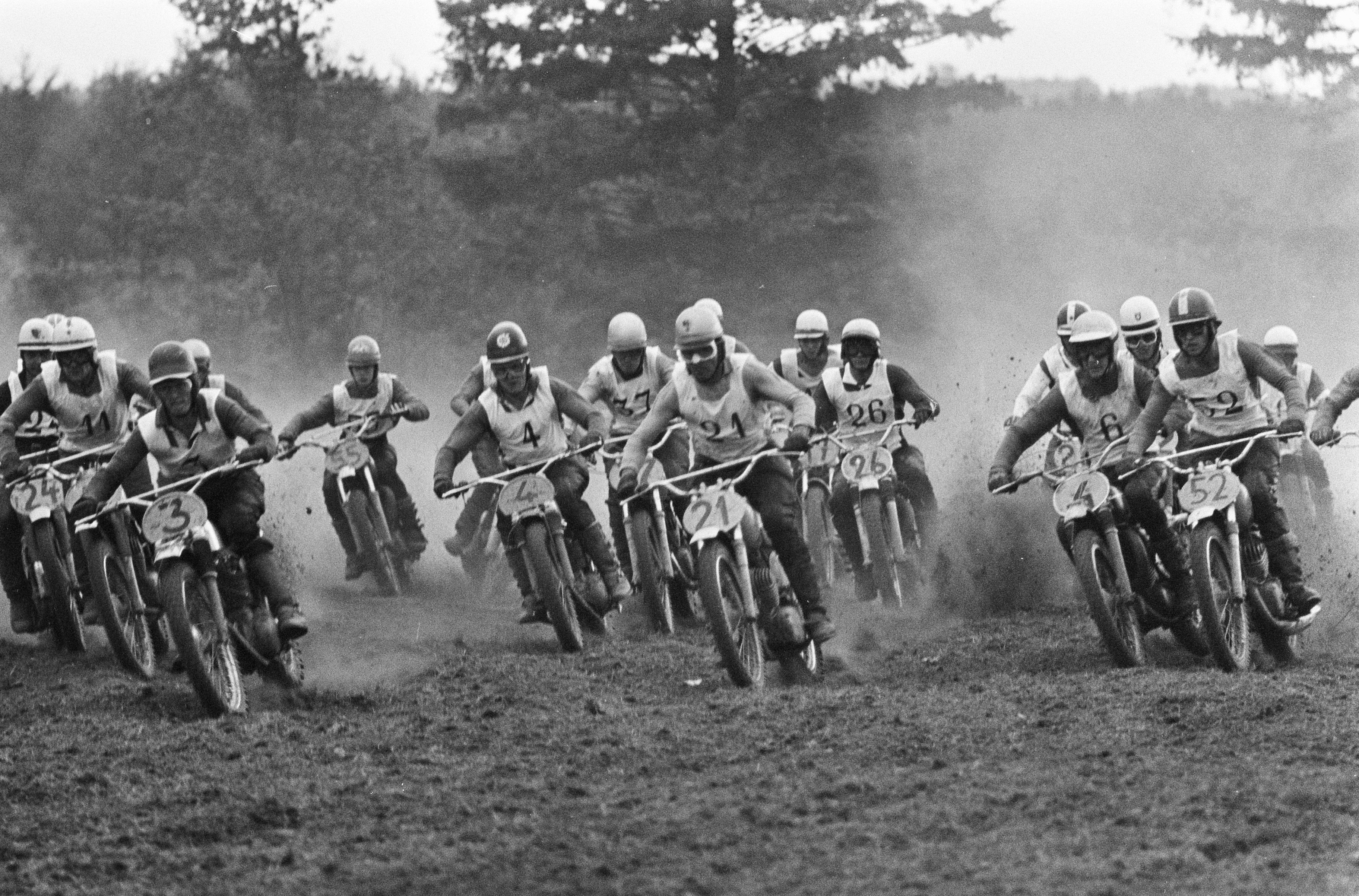 Collectie / Archief : Fotocollectie Anefo Reportage / Serie : [ onbekend ] Beschrijving : Motorcross Des Nations 1967 te Markelo. Renners in aktie Datum : 3 september 1967 Locatie : Markelo Persoonsnaam : Gunars Draugs (CZ, 11), Vic Eastwood (BSA, 3), Frans Sigmans (Husqvarna, 55), Arthur Lampkin (BSA, 4), Roger De Coster (CZ, 37), Paul Friedrichs (CZ, 21), Torsten Hallman (Husqvarna, 6), Pierre Karsmakers (CZ, 52) Trefwoorden : Motorcross Fotograaf : Koch, Eric / Anefo Auteursrechthebbende : Nationaal Archief Materiaalsoort : Negatief (zwart/wit) Nummer archiefinventaris : bekijk toegang 2.24.01.05 Bestanddeelnummer : 920-6733